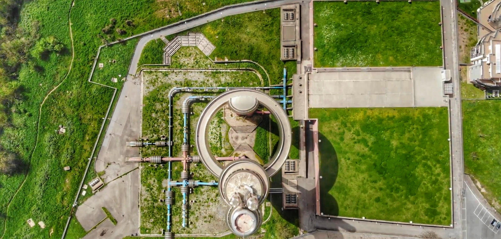 Fotografia scattata con drone della torre piezometrica del Centro Idrico EUR di Roma